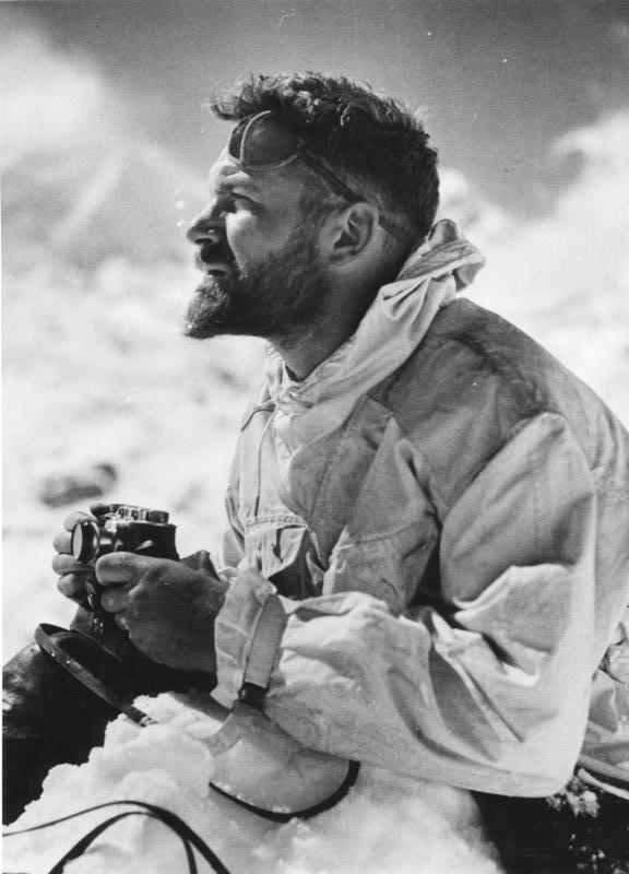 Tibetexpedition, Ernst Schäfer Zemugebiet, Dr. Schäfer Abgebildete Personen: Schäfer, Ernst Dr.: SS-Sturmbannführer, Leiter des Sven-Hedin-Institutes, Deutschland (GND 123991420)